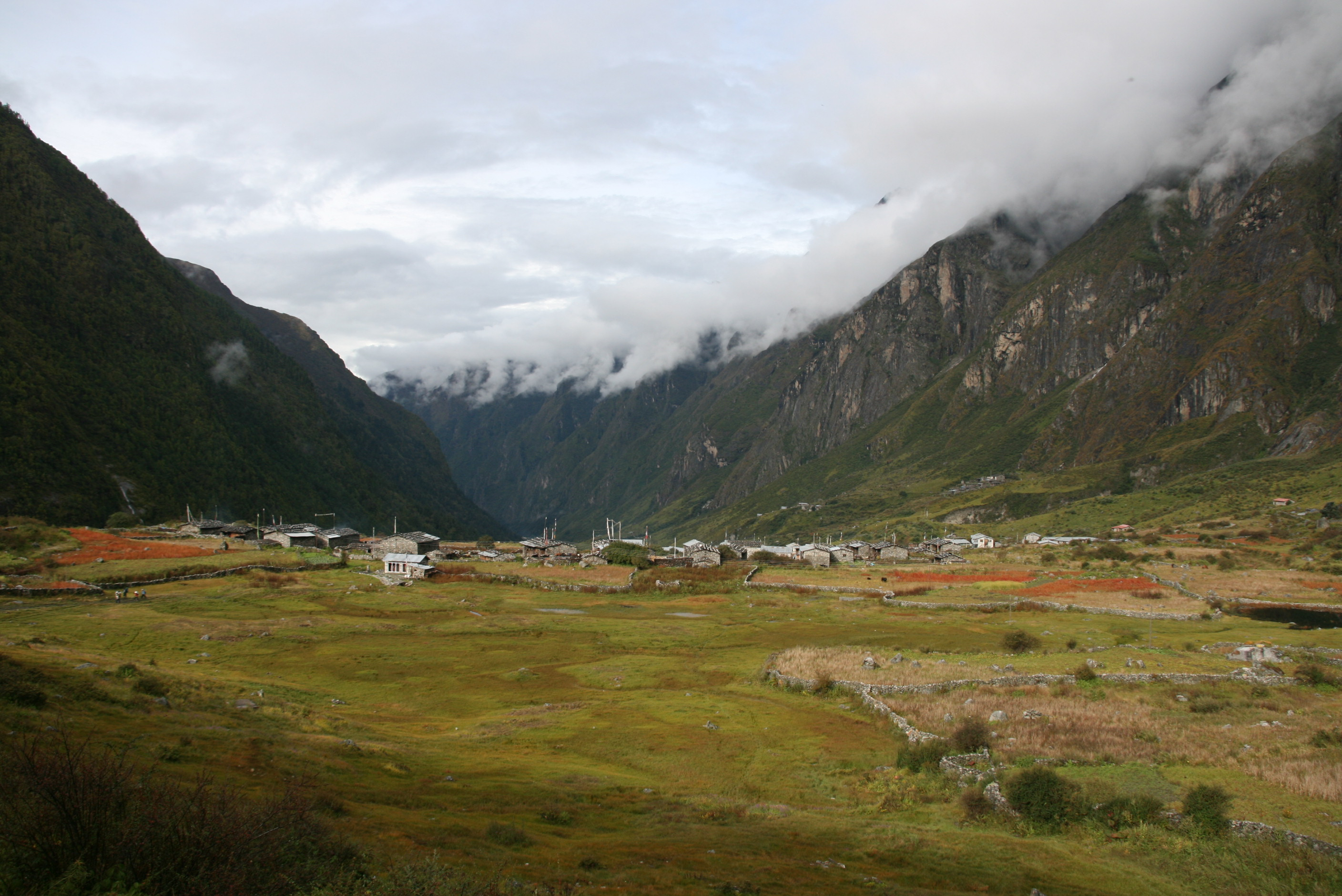 The Langtang village, in langtang valley